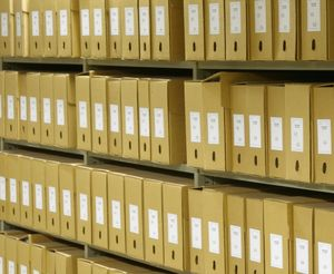 Archives de l'État en Belgique